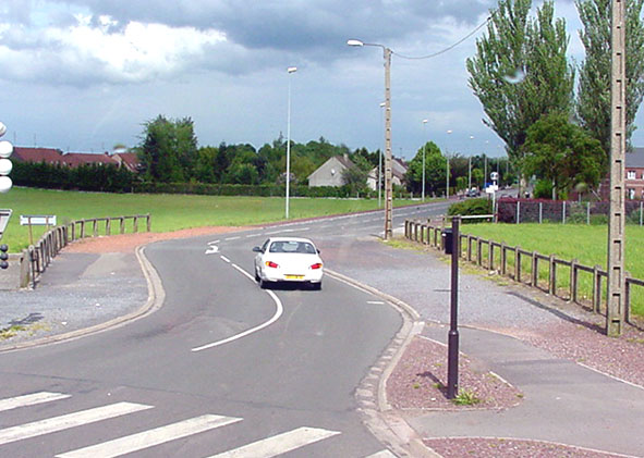 Dispositif de démonstration de l'association ADOPTA ; association Loi 1901 réunissant la ville de Douai, le Conseil régional du Nord Pas-de-Calais et l'Agence de l'eau Artois picardie, dédiée à l'expérimentation et à la prompotion de techniques alternatives de lutte contre les inondations et le ruissellement urbain. Cette route d'apparence normale cache une chaussée-réservoir. [1]